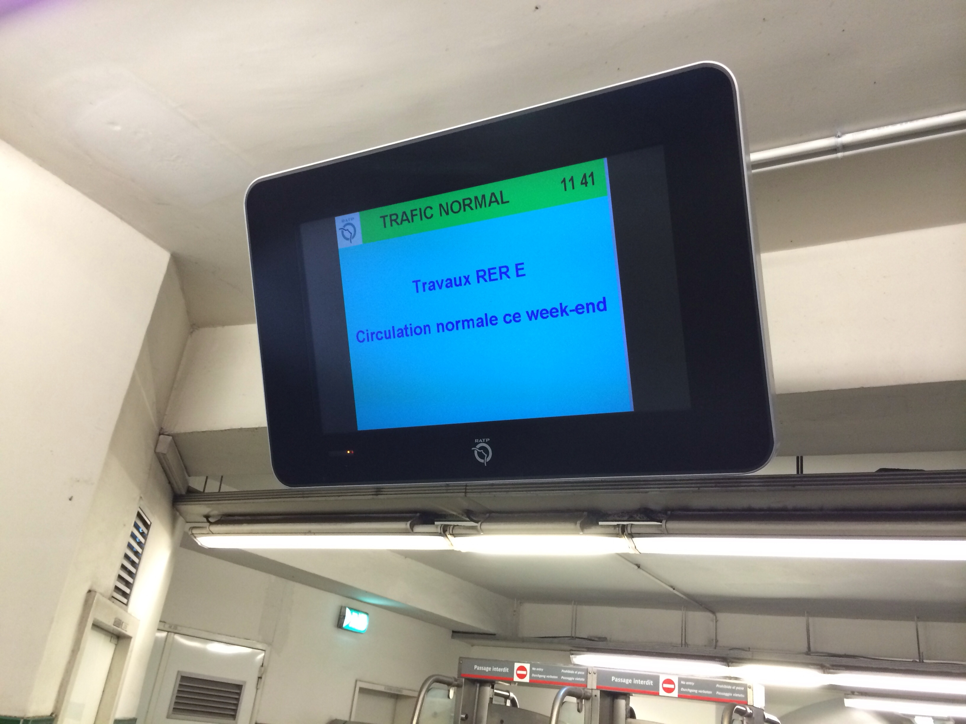 Écran IMAGE à la station de métro Odéon du métro de Paris.